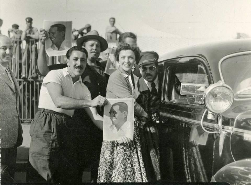 Primer Festival Internacional de Cine en Mar del Plata, 1954. Inventario 25028 General Archive of the Nation Native nameArchivo General de la Nación ArgentinaParent institutionPoder Ejecutivo Nacional LocationBuenos Aires, ArgentinaCoordinates34° 36′ 17″ S, 58° 22′ 14″ W Established28 August 1821Web pageAGNAuthority control : Q2860529 VIAF: 158621023 ISNI: 0000 0001 2375 5869 LCCN: n82144709 NKC: kn20121211004 WorldCat institution QS:P195,Q2860529 This file, was provided to Wikimedia Commonsthanks to an agreement between the General Archive of the Nation of Argentina and Wikimedia Argentina.